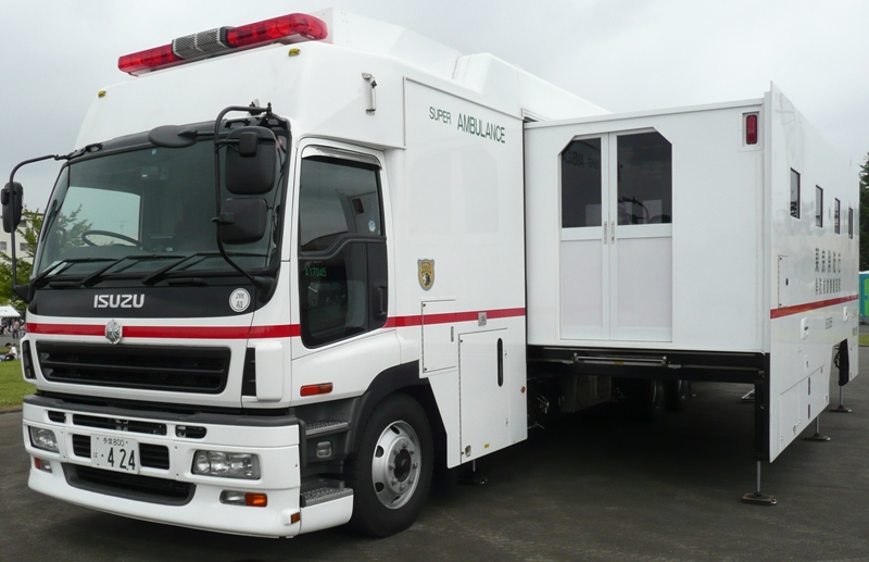 Super Ambulance.